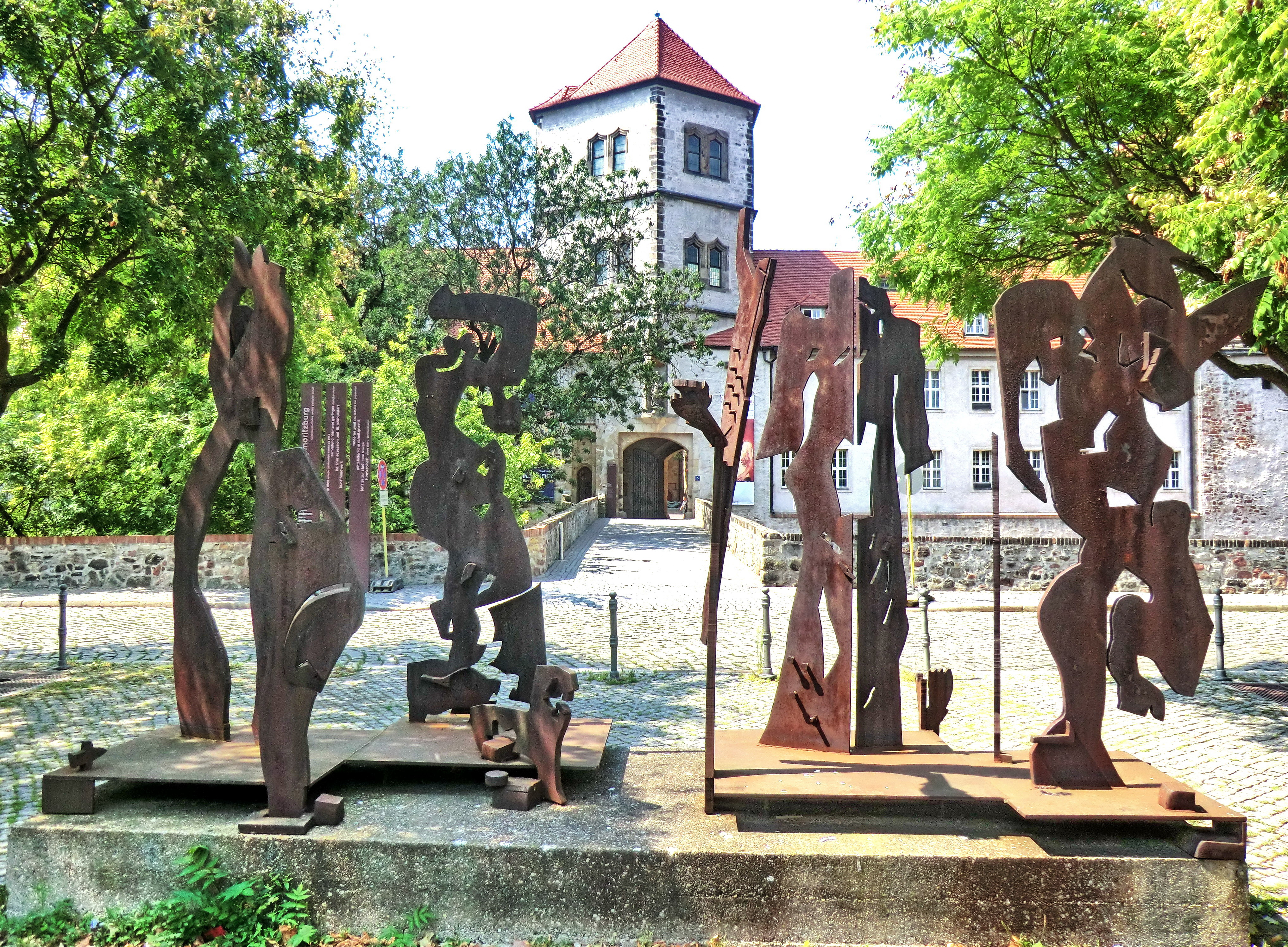 "Mauresken" Stahlplasik von Irmtraud Ohme in Halle (Saale) 1987